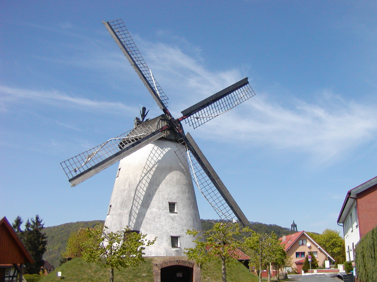 de:Windmühle Holzhausen This is a photograph of an architectural monument.